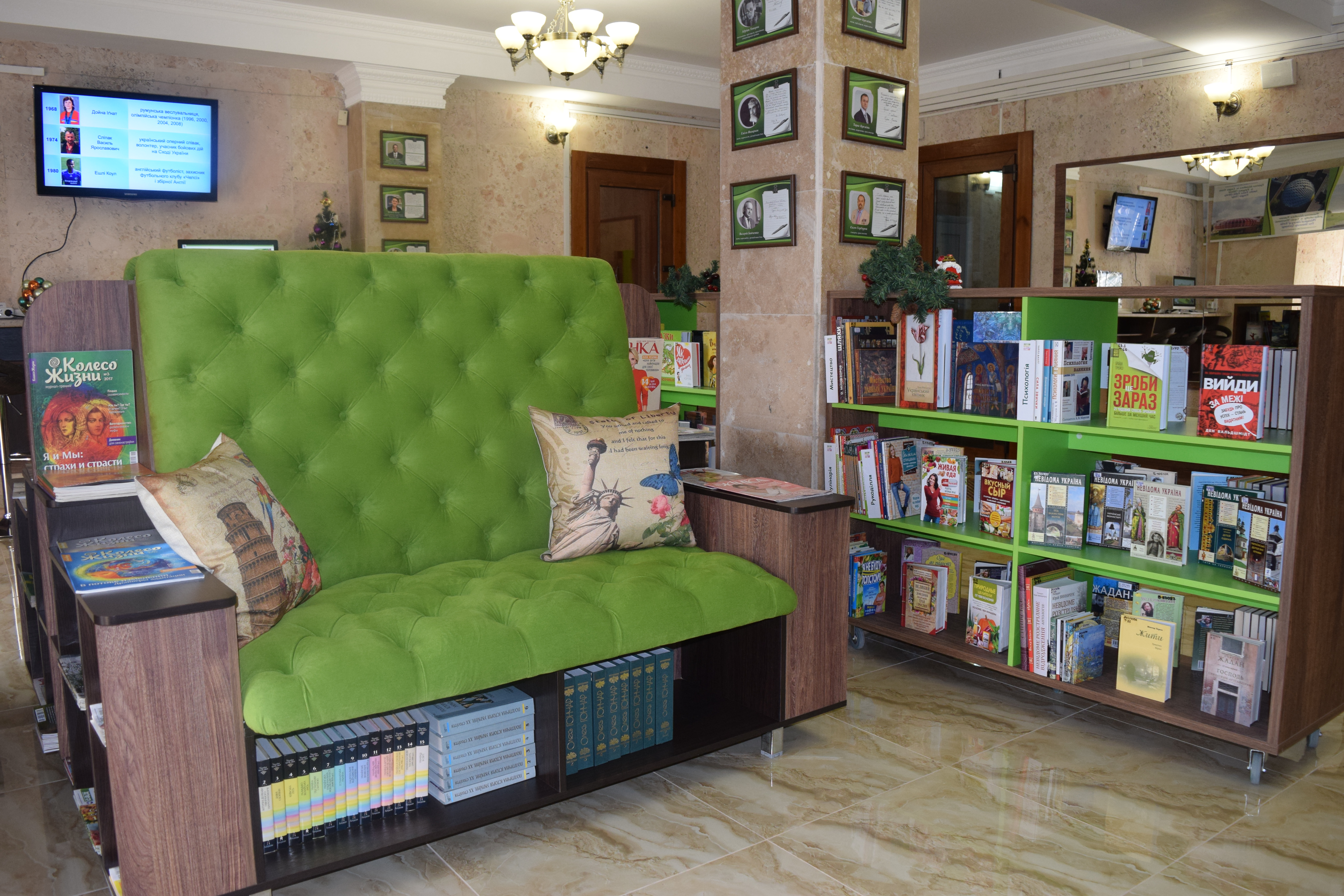 Вид на хол бібліотеки